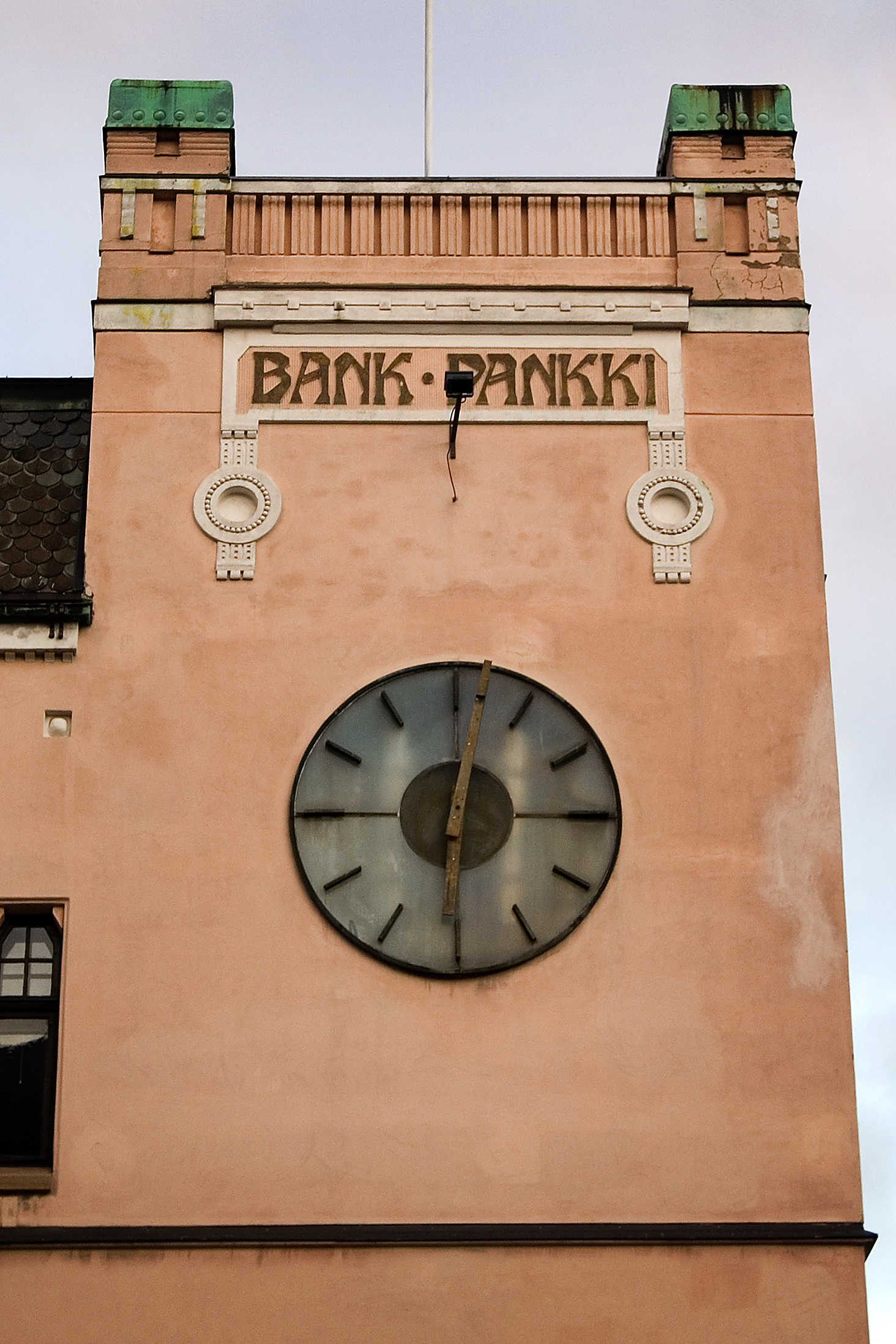 Vanha pankki, nykyään alakerrassa olutravintola. Aurakatu 5.